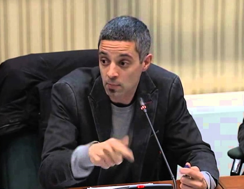 Albert Noguera en la Comisión de Estudio del Proceso Constituyente del Parlamento catalán, en 2016.